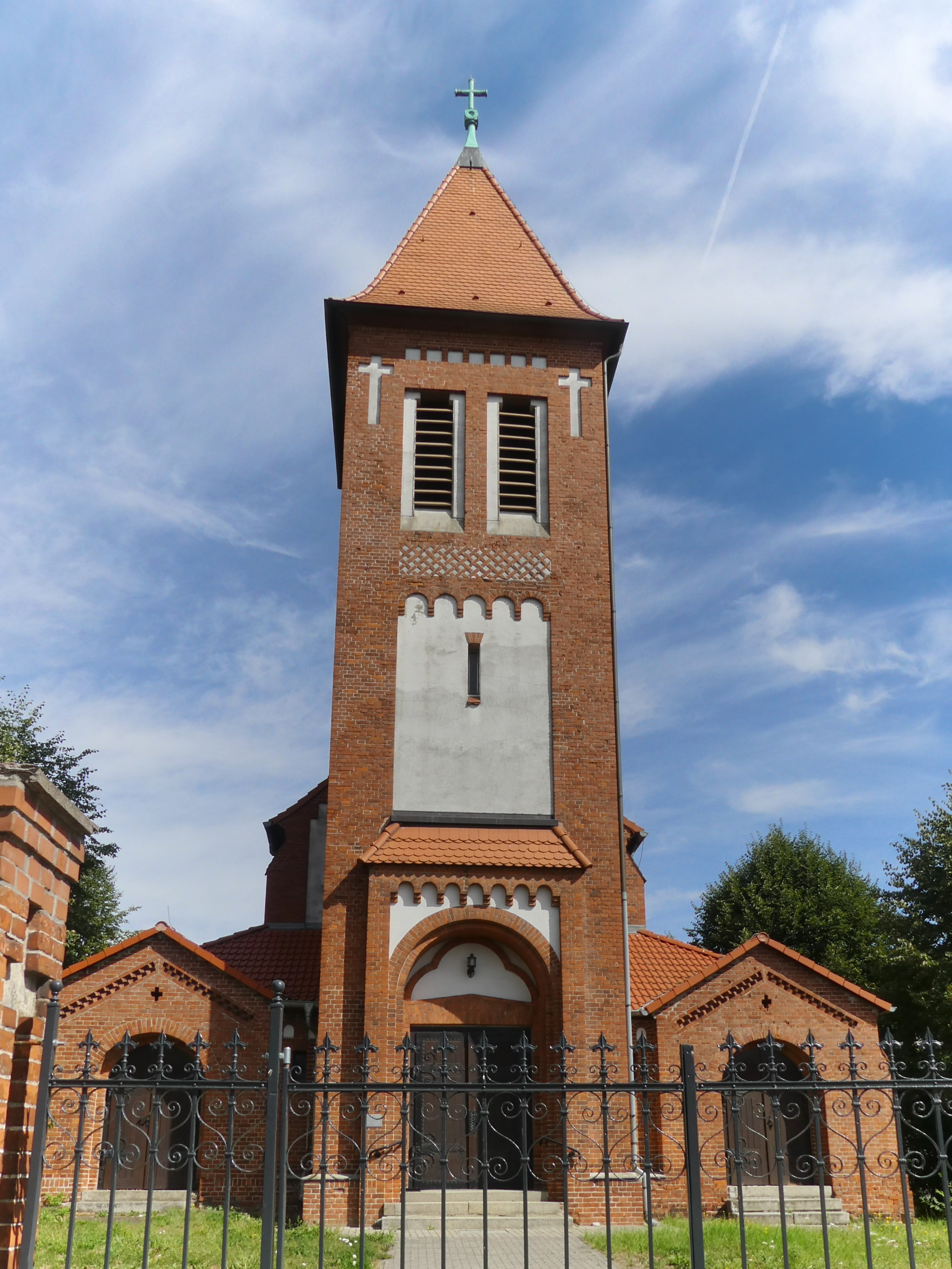 Römisch katholische Kirche "Heilige Familie" in Strasburg/Uckermark